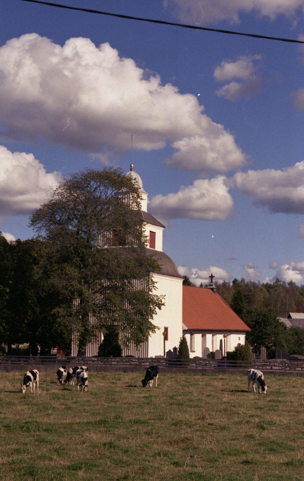 Kor utanför Sällstorps kyrka. This is a scan from an negative. The date is scan date.